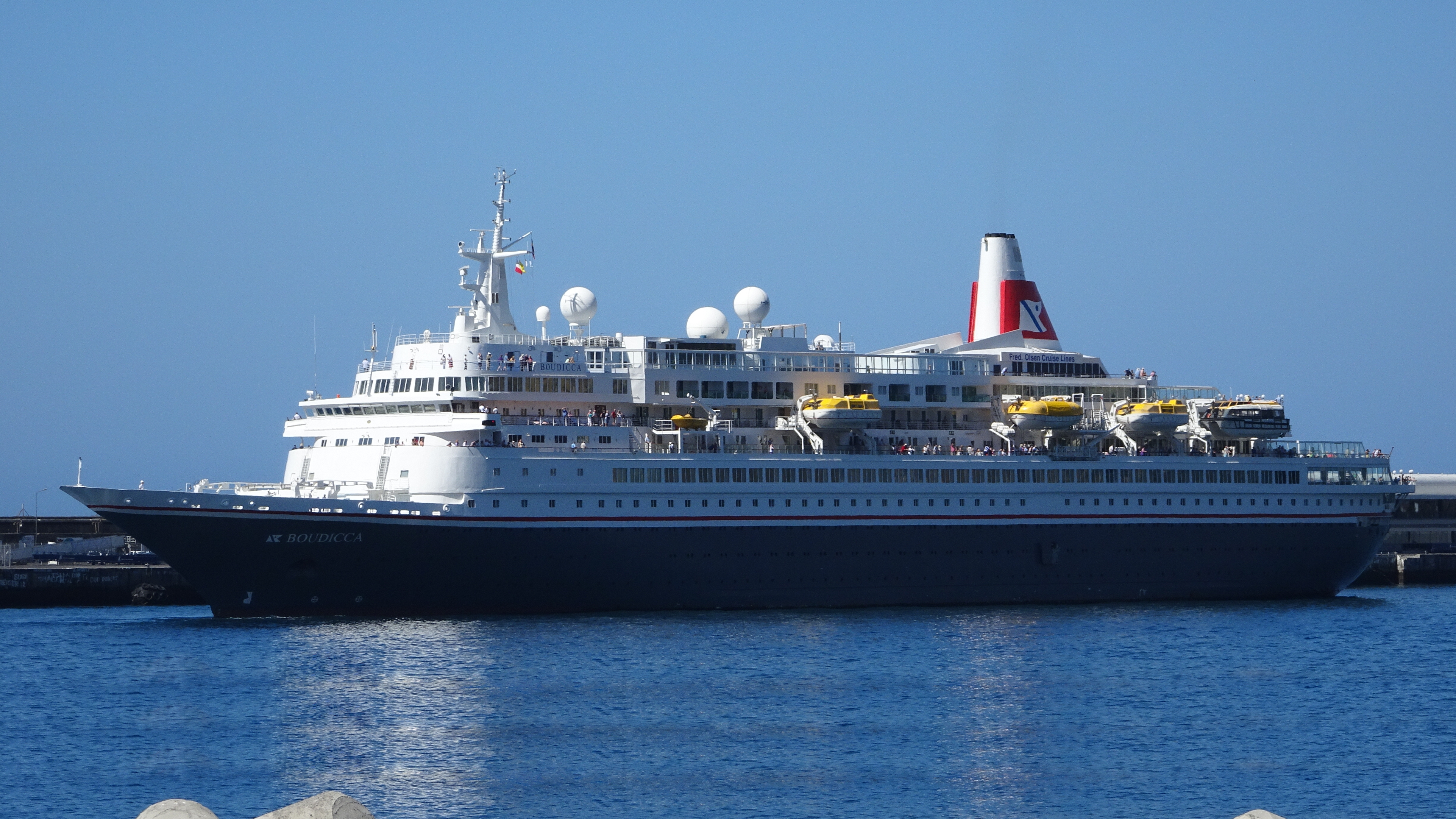 Die Boudicca im Hafen von Funchal, Madeira